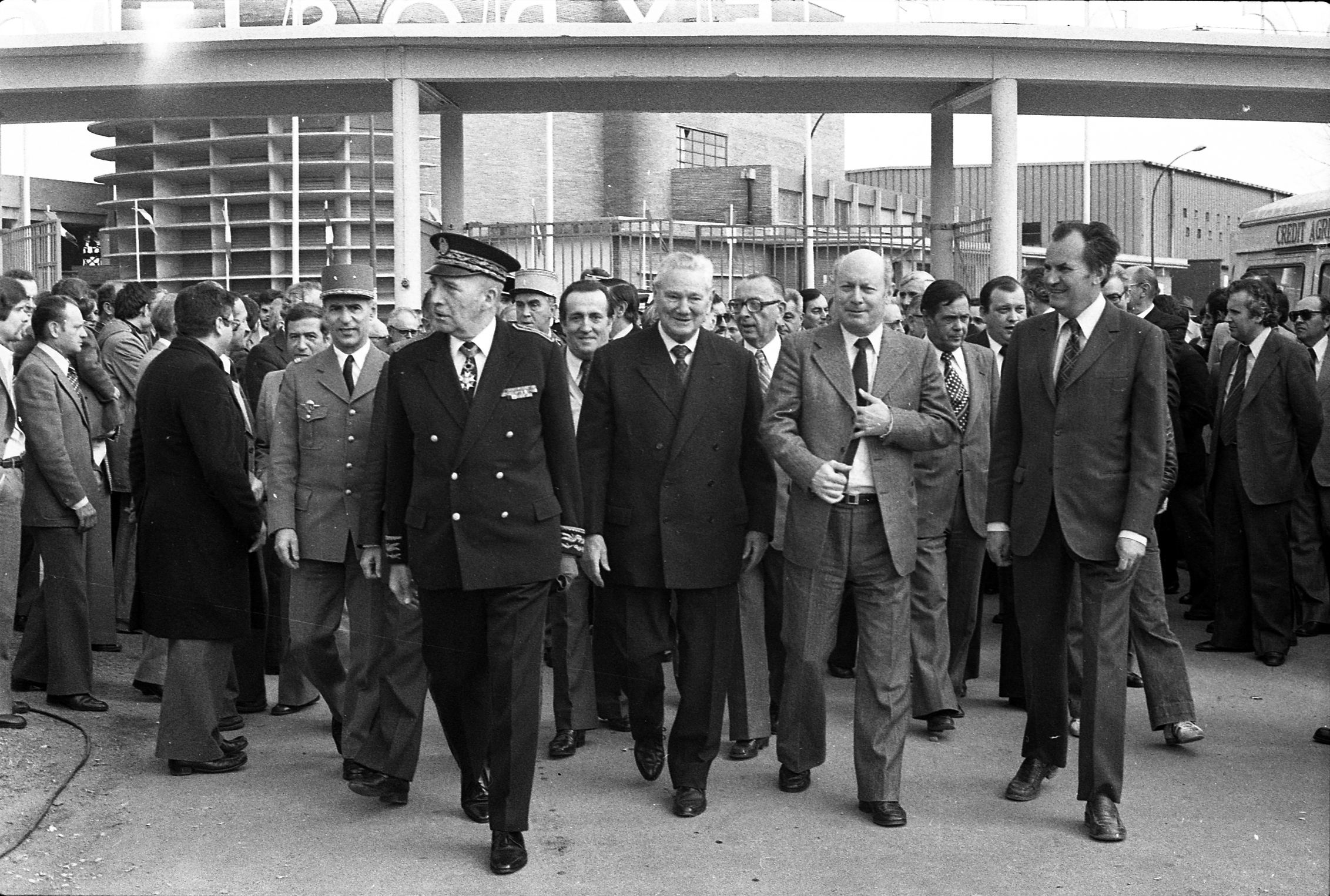 Parc des Expositions (île du Ramier). 4 avril 1978. Vue d'ensemble de l'arrivée des officiels (vue de face) : au 1er plan MM Tony-Roche (Préfet de Midi-Pyrénées), Pons (Président de Midi-Pyrénées), Brisebois (Président délégué), Guillou (Commissaire général représentant le comité organisateur) ; au 2nd plan groupe de personnes ; en arrière-plan grille d'entrée du Parc des Expositions. Cliché pris lors de l'inauguration du 44ème Concours régional agricole.